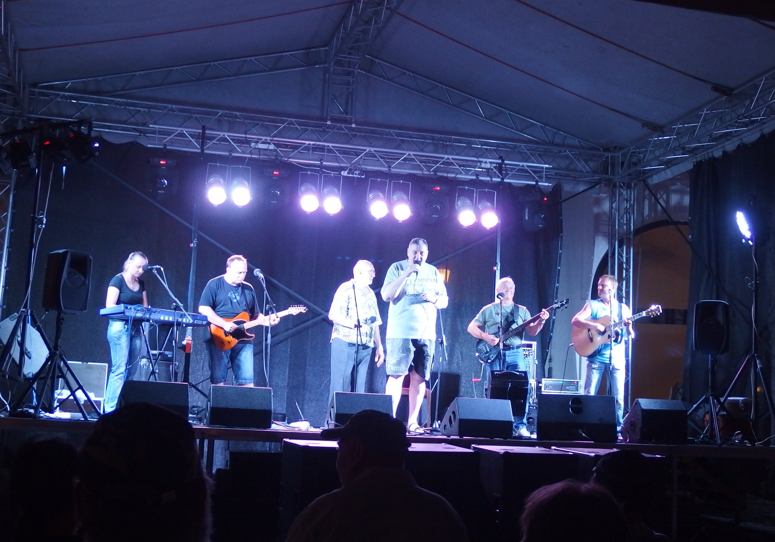 Lokálka, česká folková skupina z Hradce Králové v Holešově 2017, zpívá František Zapadlo.